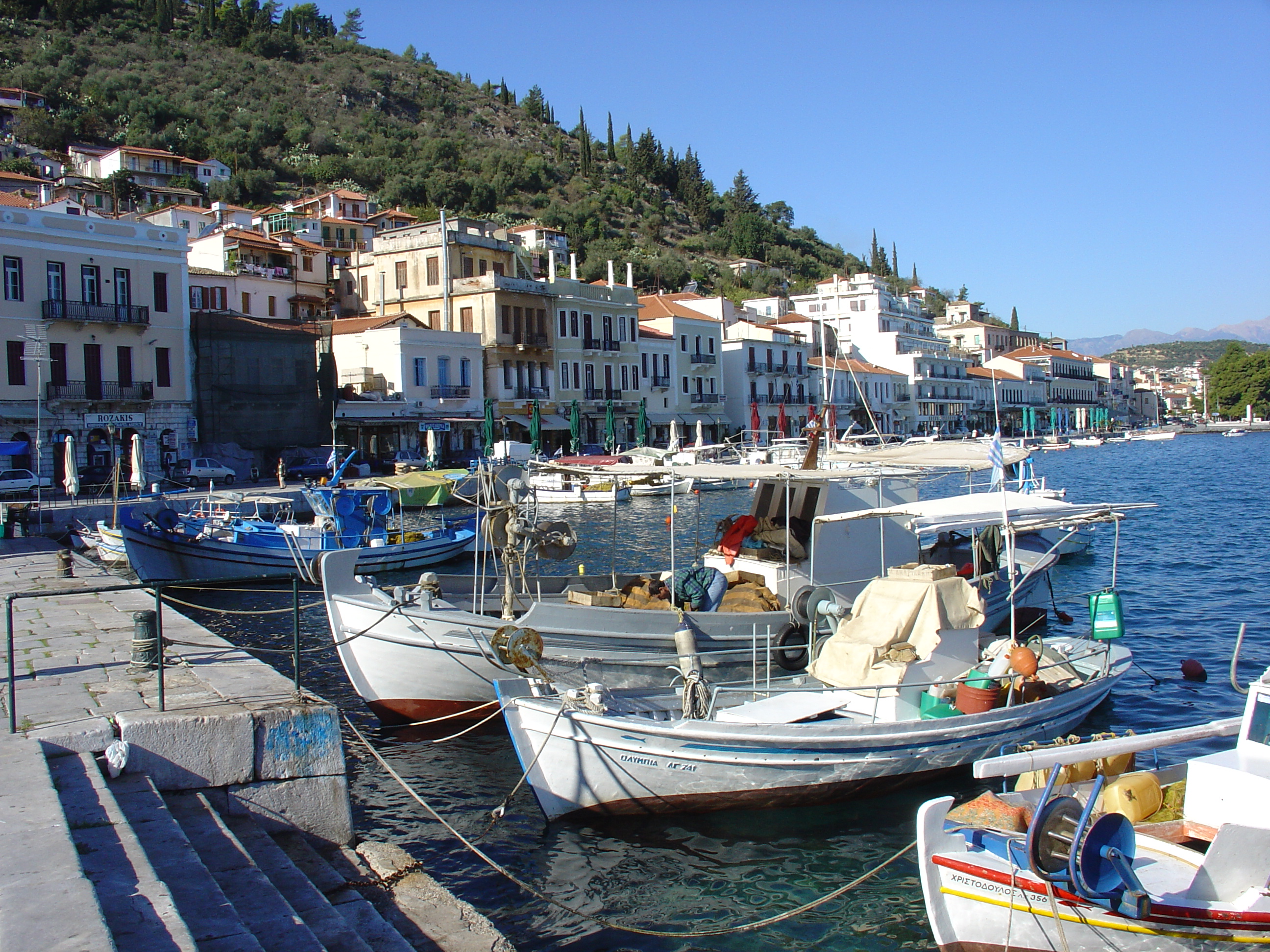 Beschrijving: visserdorp Gythio in het zuiden van de Peloponnisos Bron: ~ Auteur: Rene Konijnenberg